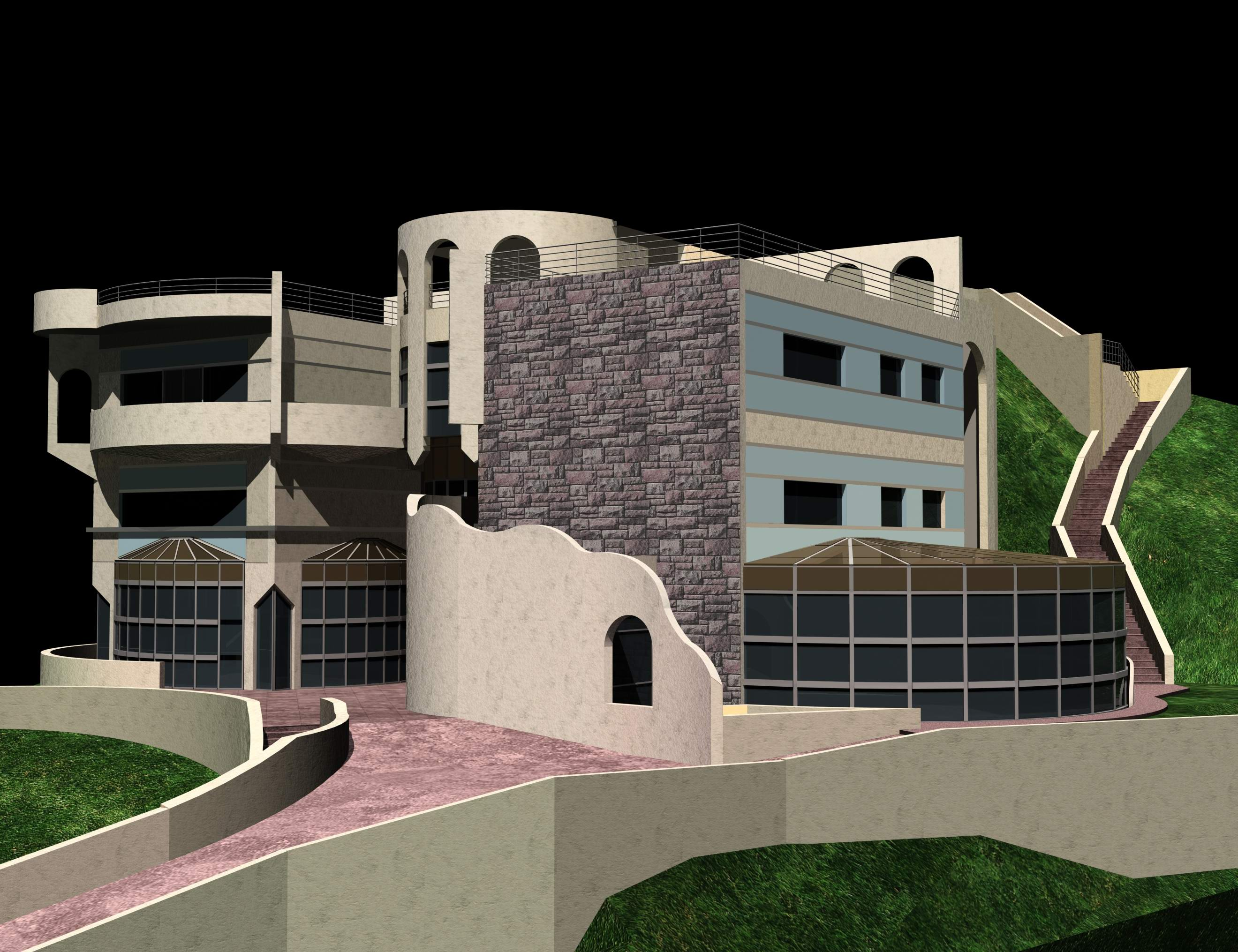 Progetto Centro Culturale dell' ambasciata di Libia a Roma Architetto: Oreste Ruggiero